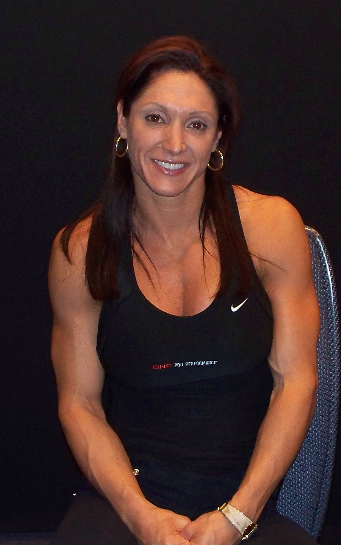 Tracey Greenwood